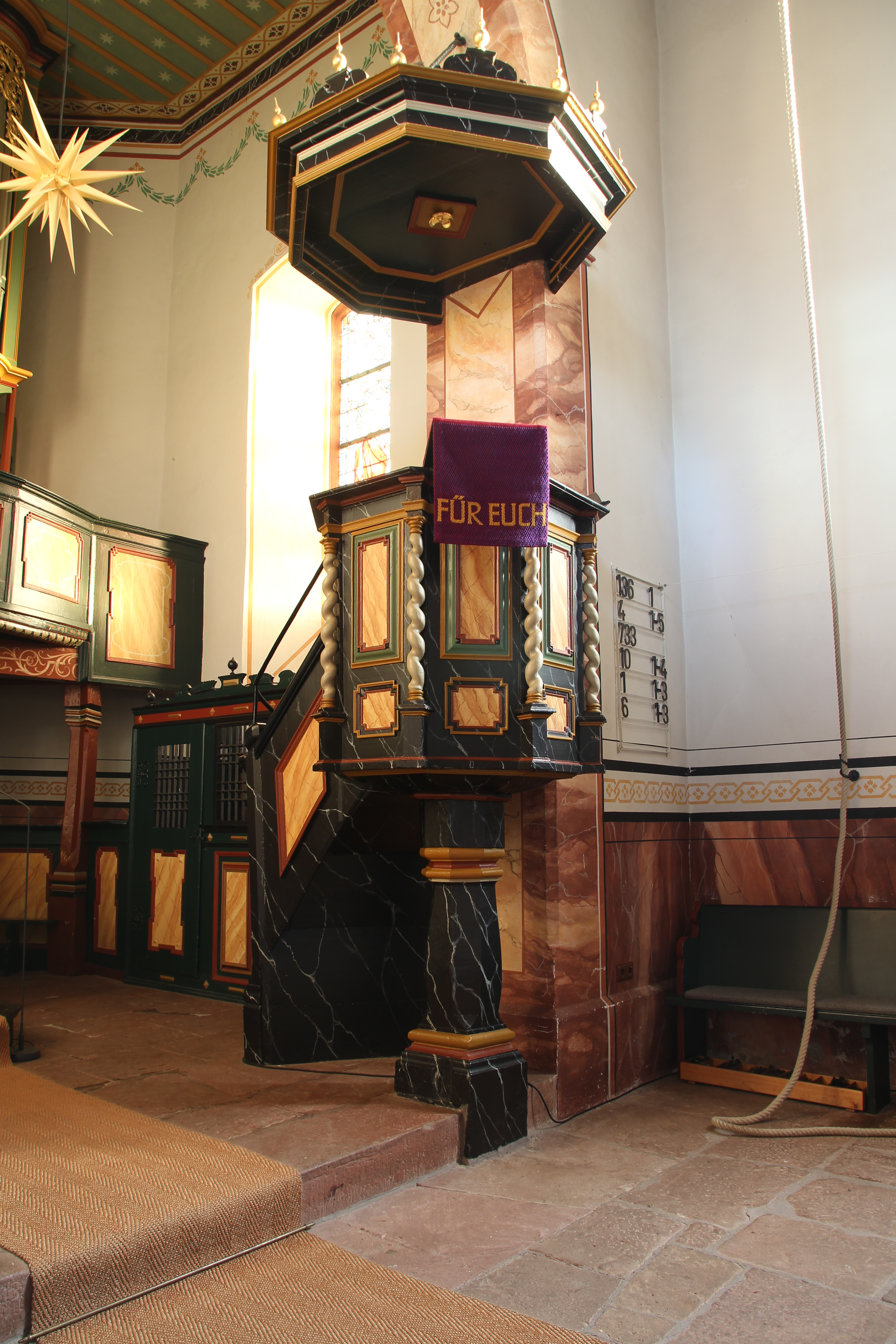 Siehe Bild und Dateiname